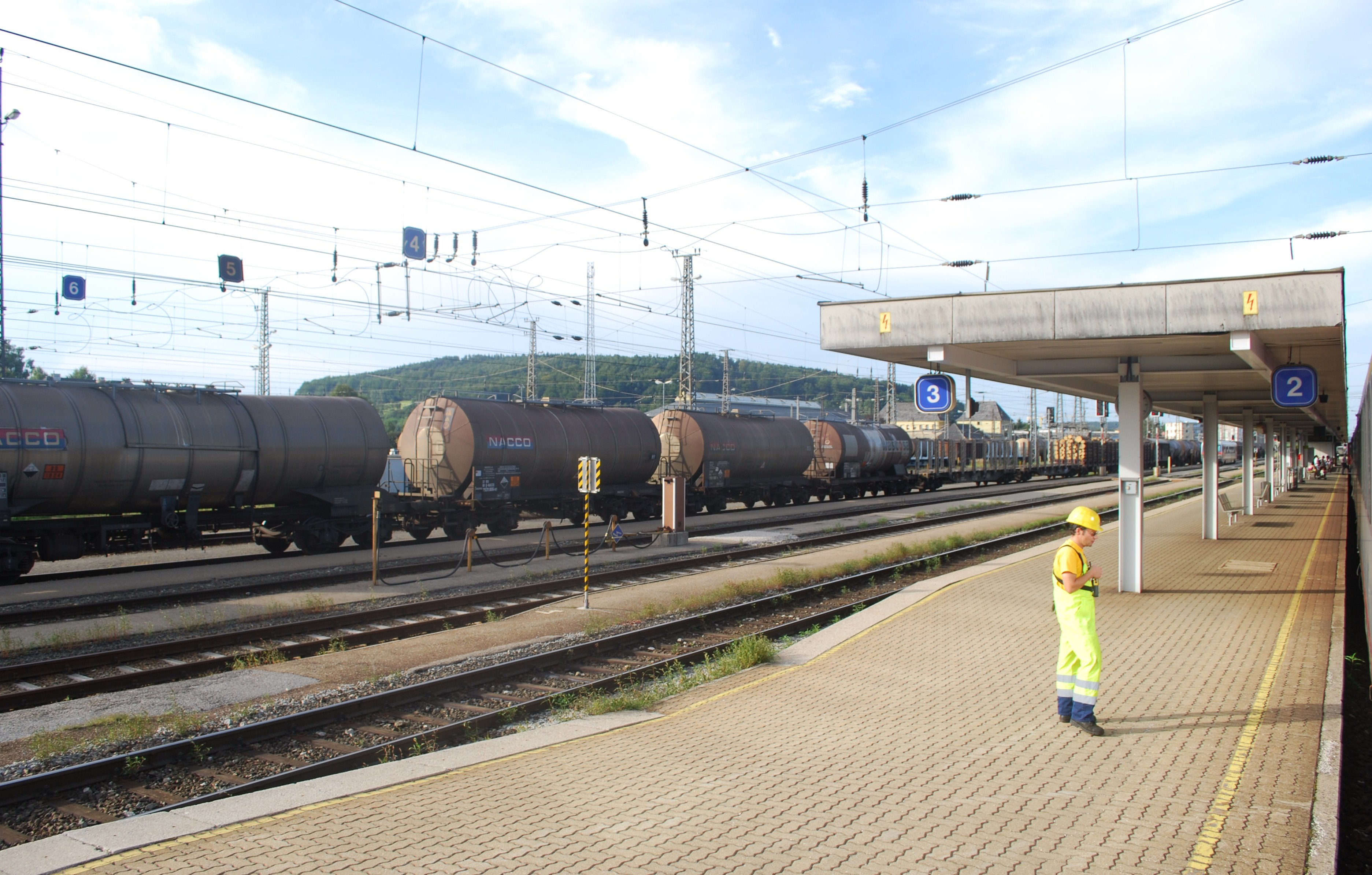 Bahnsteige 2-6